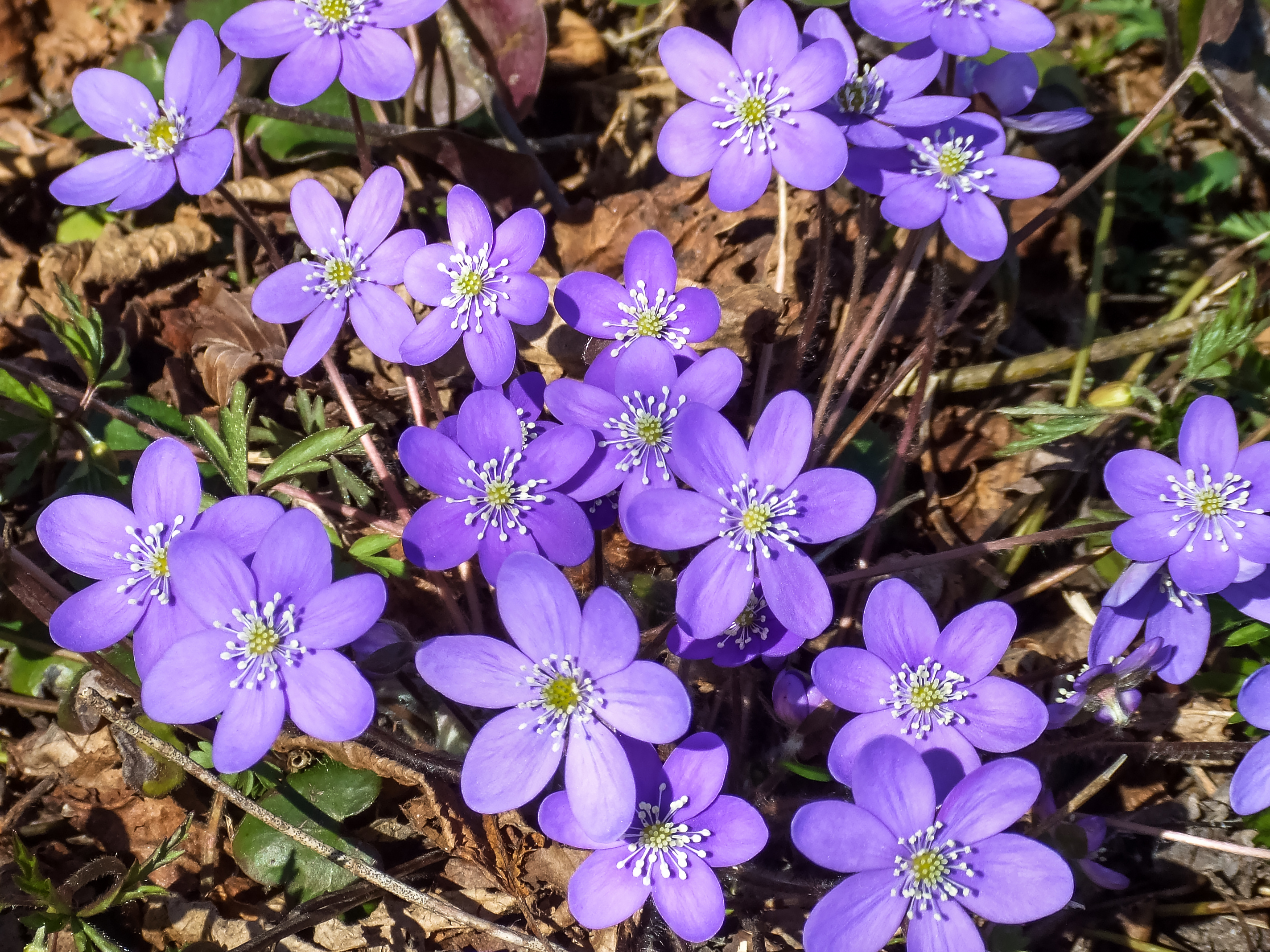 Blåsippor på Gotland, Sverige